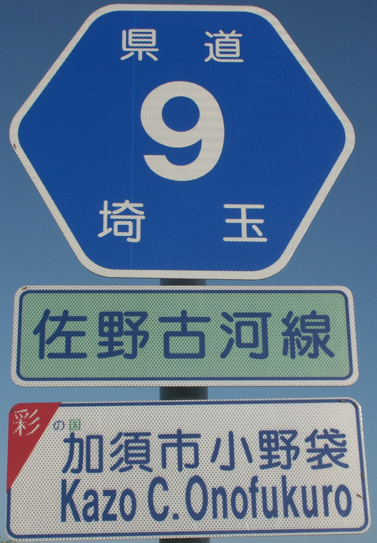 埼玉県道９号線の路線番号標識